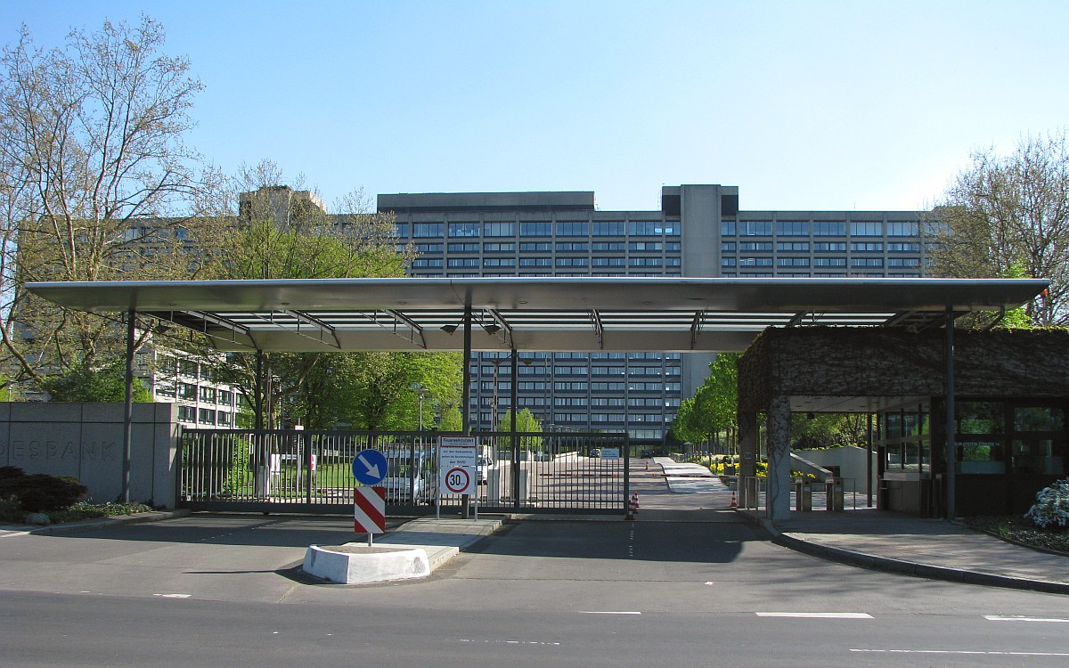 Frankfurt am Main Wilhelm-Epstein-Straße & Gebäude Haupteingang & Gebäude Deutsche Bundesbank Main Foto 2009 Wolfgang Pehlemann Wiesbaden IMG_4827